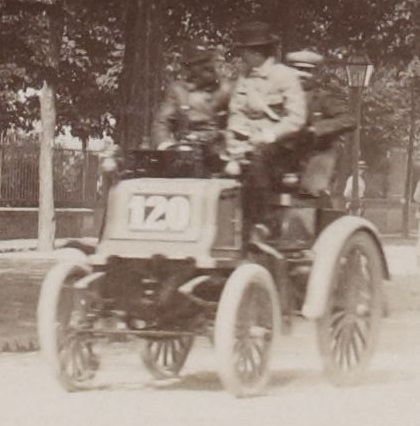 [Collection Jules Beau. Photographie sportive] : T. 7. Année 1898 / Jules Beau : F. 29. [Paris - Amsterdam et retour, 5 juillet 1898] ; possible Georges Bouton à la gauche d'André Michelin (départ de la course Tourisme à La Fourche de Champigny-sur-Marne).